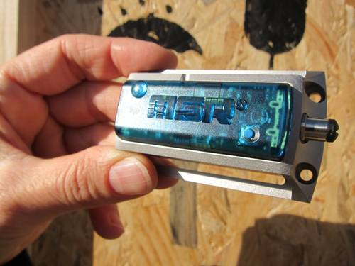 Datenlogger MSR165 mit integriertem Beschleunigungssensor